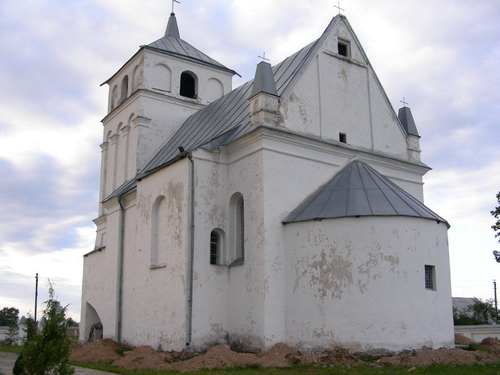 Беларуская (тарашкевіца): Касьцёл Сьвятых апосталаў Пятра і Паўла з агароджай. в. Новы Сьвержань This is a photo of Belarusian heritage monument. Reference number: 612Г000620 ( WLM)